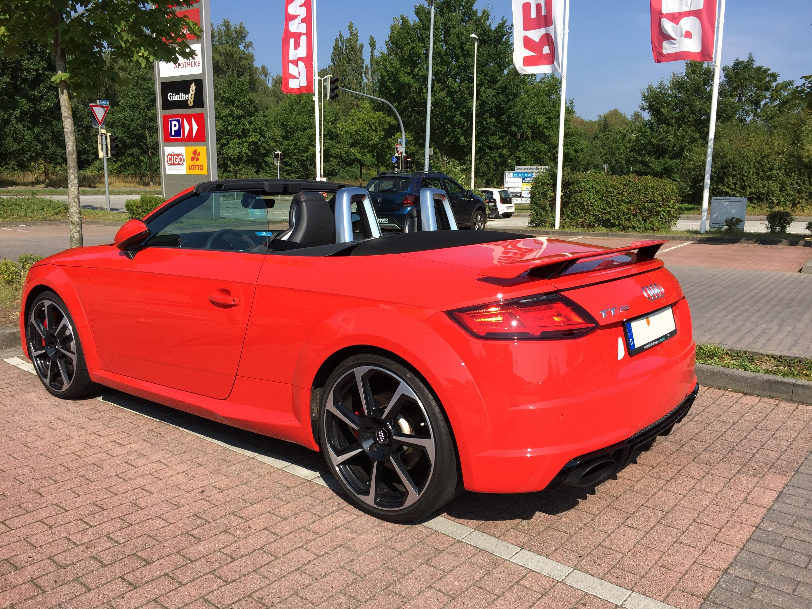 Audi TT RS